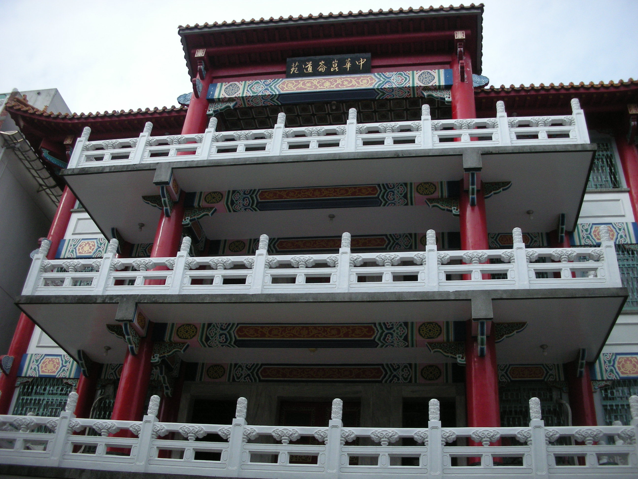 中文（台灣）: 中華崑崙道苑。